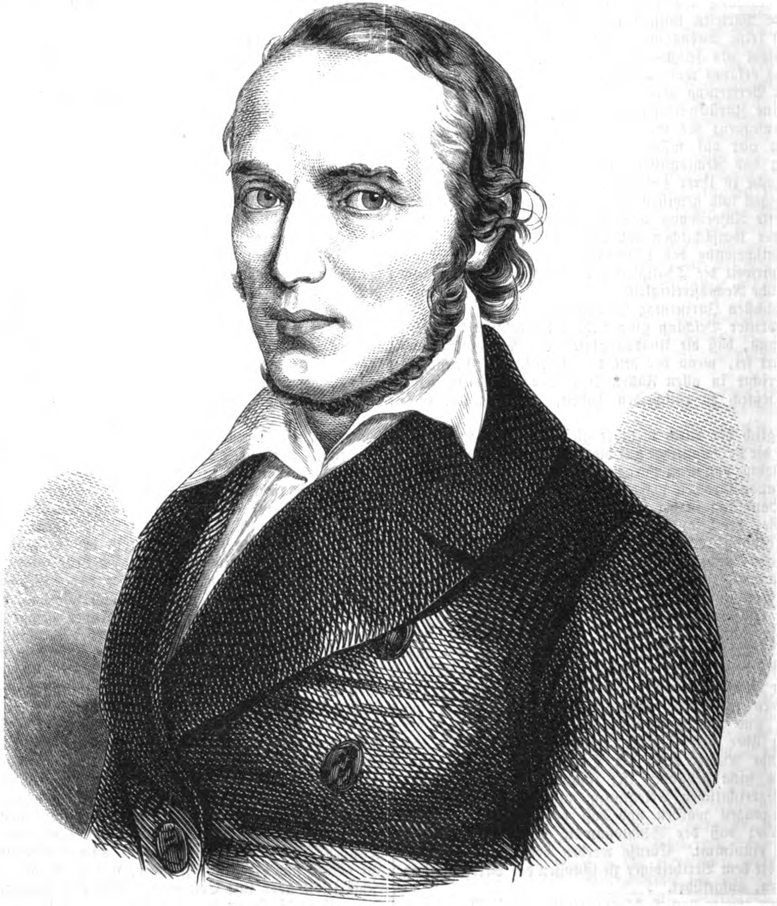 Sylvester Jordan, deutscher Jurist und Politiker im 19. Jh.